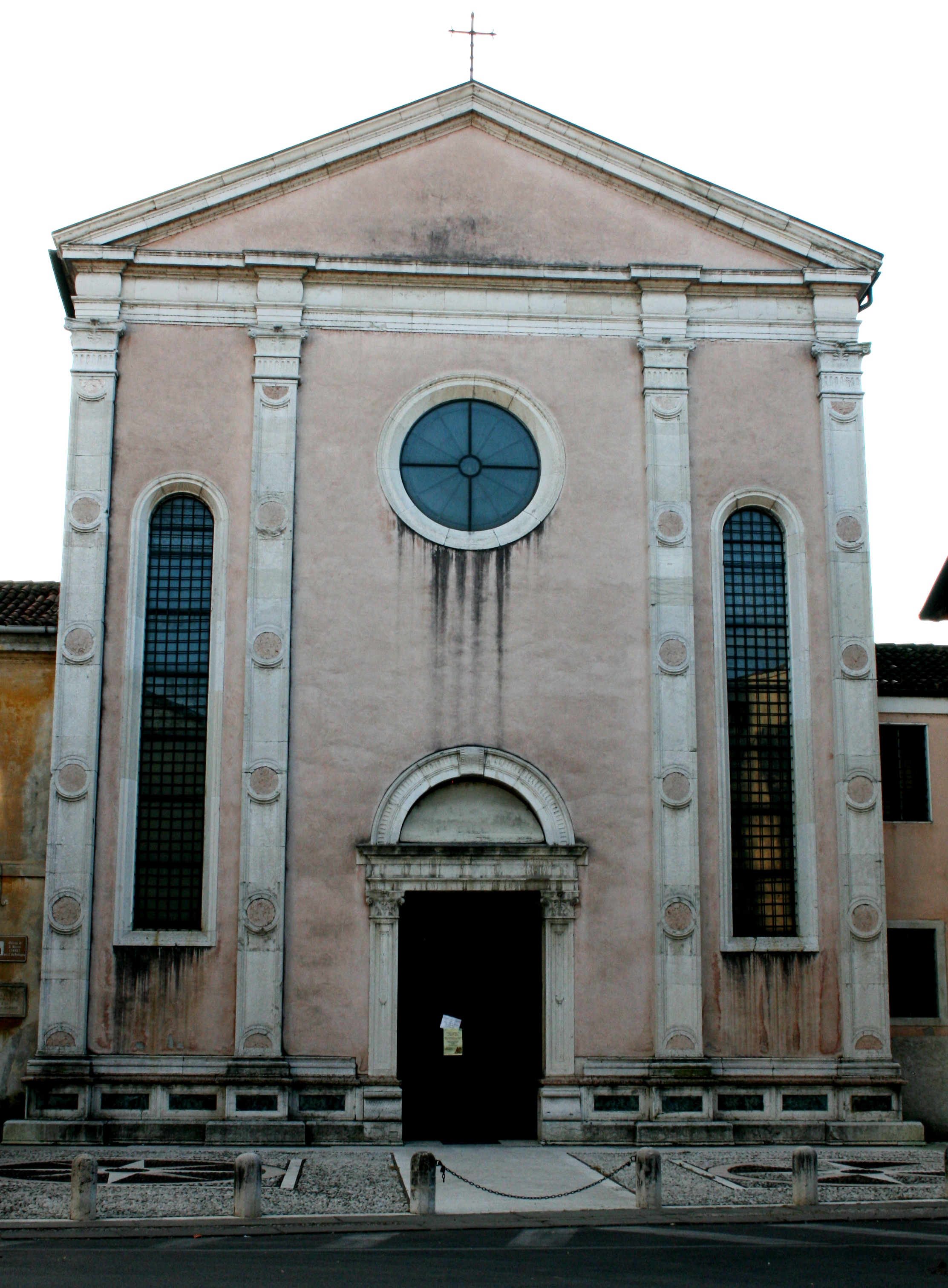 Chiesa di San Rocco, Vicenza: facciata.